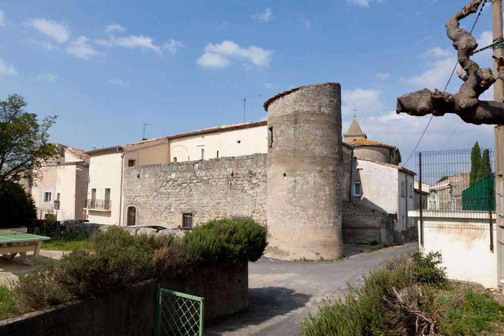 Vestige des anciennes fortifications.